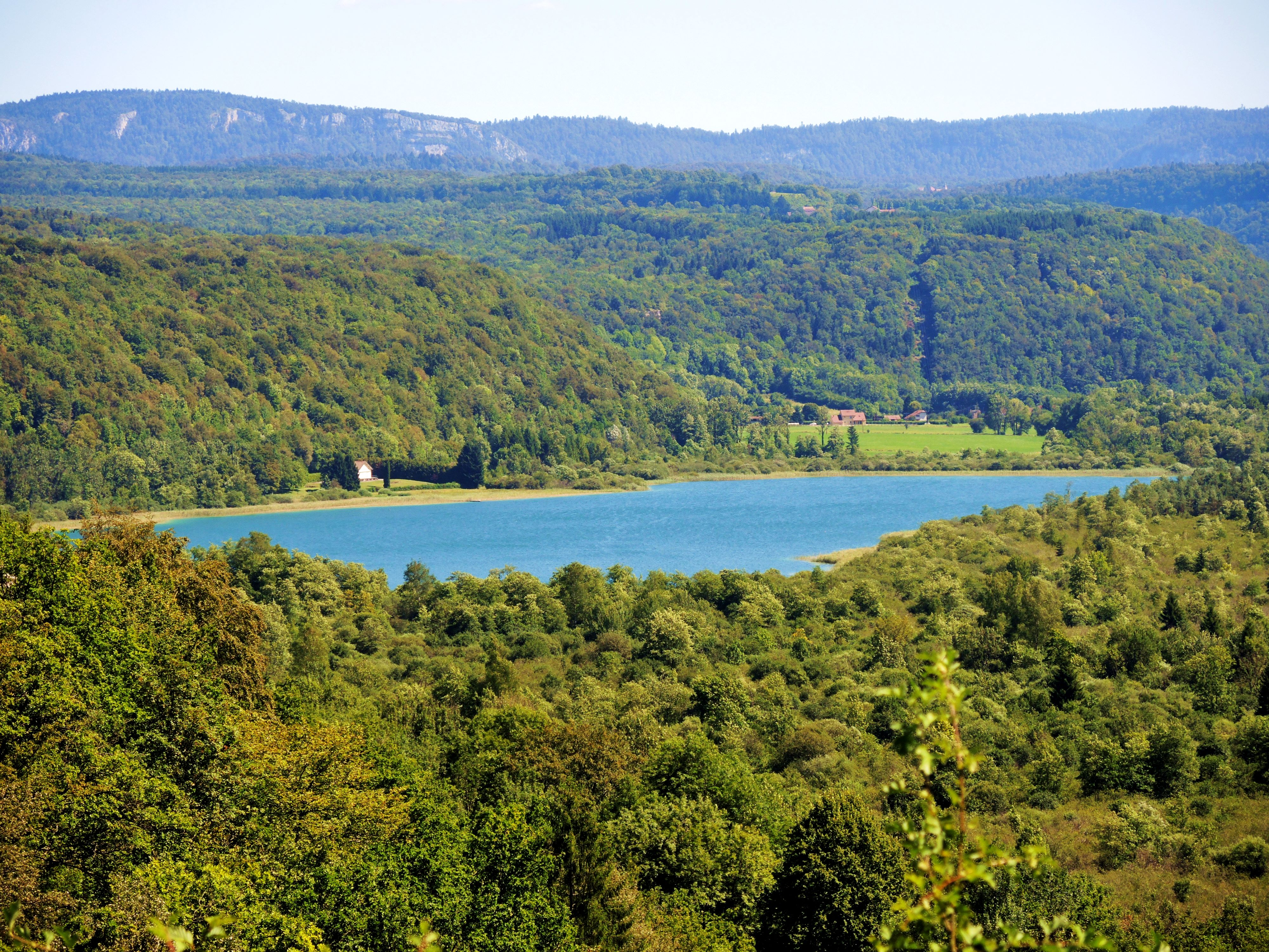 Autre vue sur le lac de Chambly